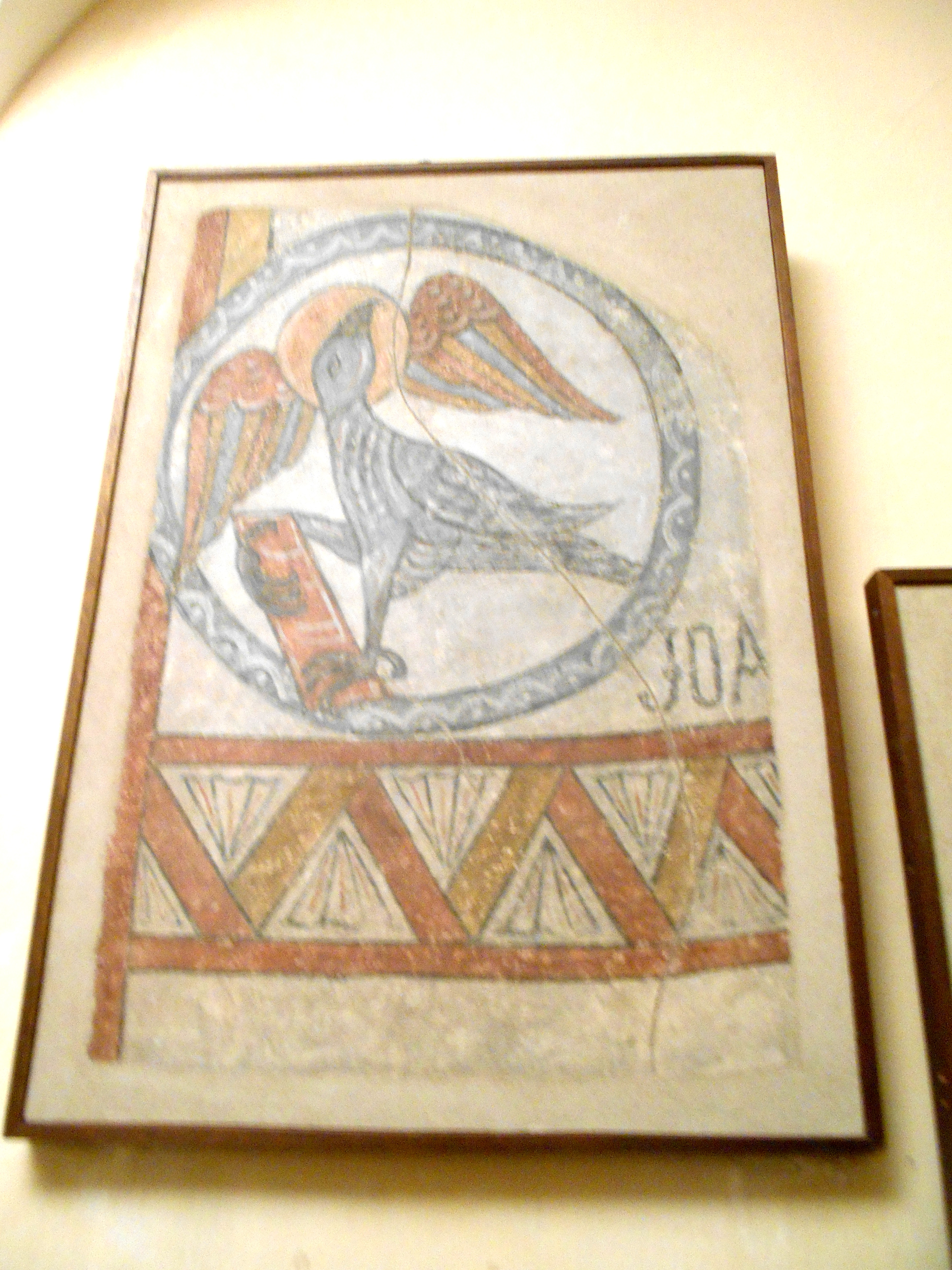 Pintures romàniques de Sant Salvador de Casesnoves, a Illa.